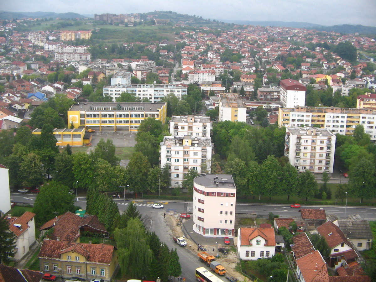 Pogled na dijelove naselja Paprikovac (lijevi gornji dio slike), Nava varoš (zgrade na sredini slike) i Petrićevac (kuće u pozadini).